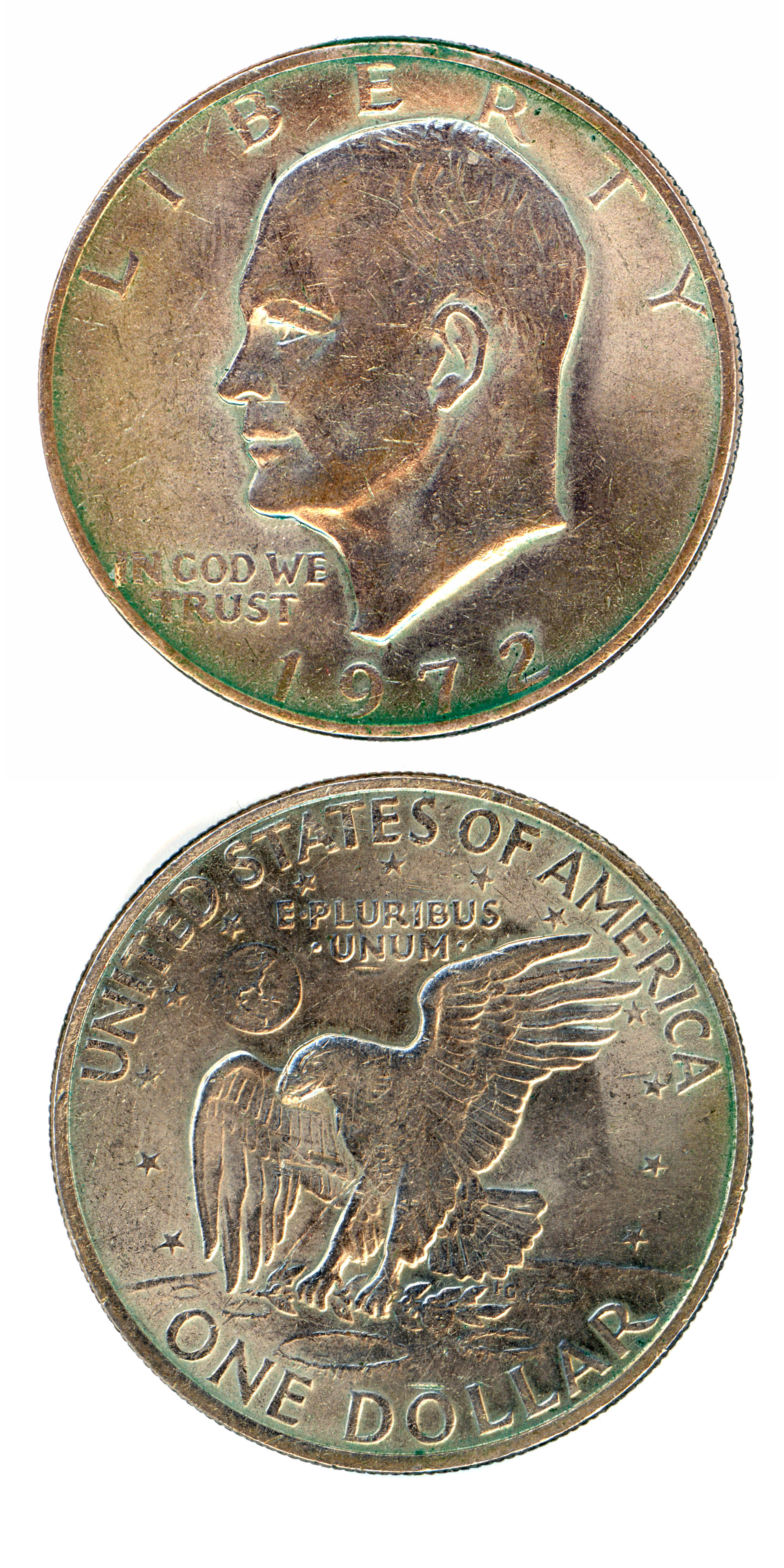 One Dollar 1972, Eisenhower, beide Seiten